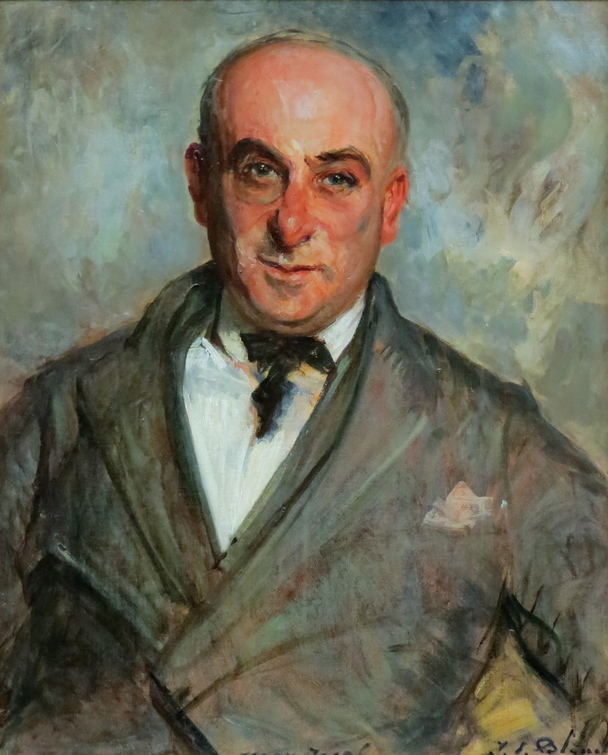 Etude pour le portrait de Max Jacob, 1921 par Jacques-Emile Blanche.